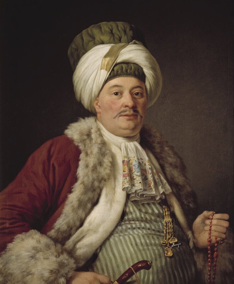 Asmund Palm, köpman i Konstantinopel